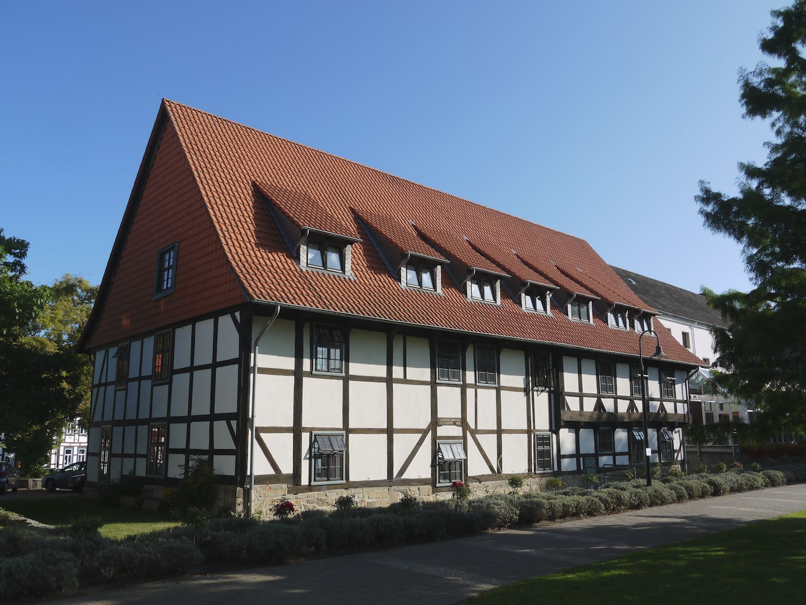 Ehemaliges Wohngebäude des Garßenhof. Das Gebäude wurde 1980-82 von Salzgitter-Gitter in den heutigen Rosengarten von Salzgitter-Bad umgesetzt.